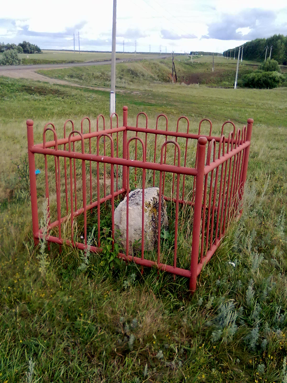 Памятник датированный 1347 годом второй памятник